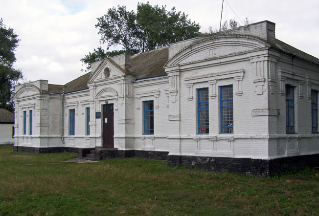 Колишня_земська_школа_у_Сулимівці_на_Київщині.jpg: Колишня земська школа (нині клуб) у селі Сулимівка Яготинського району Київської області